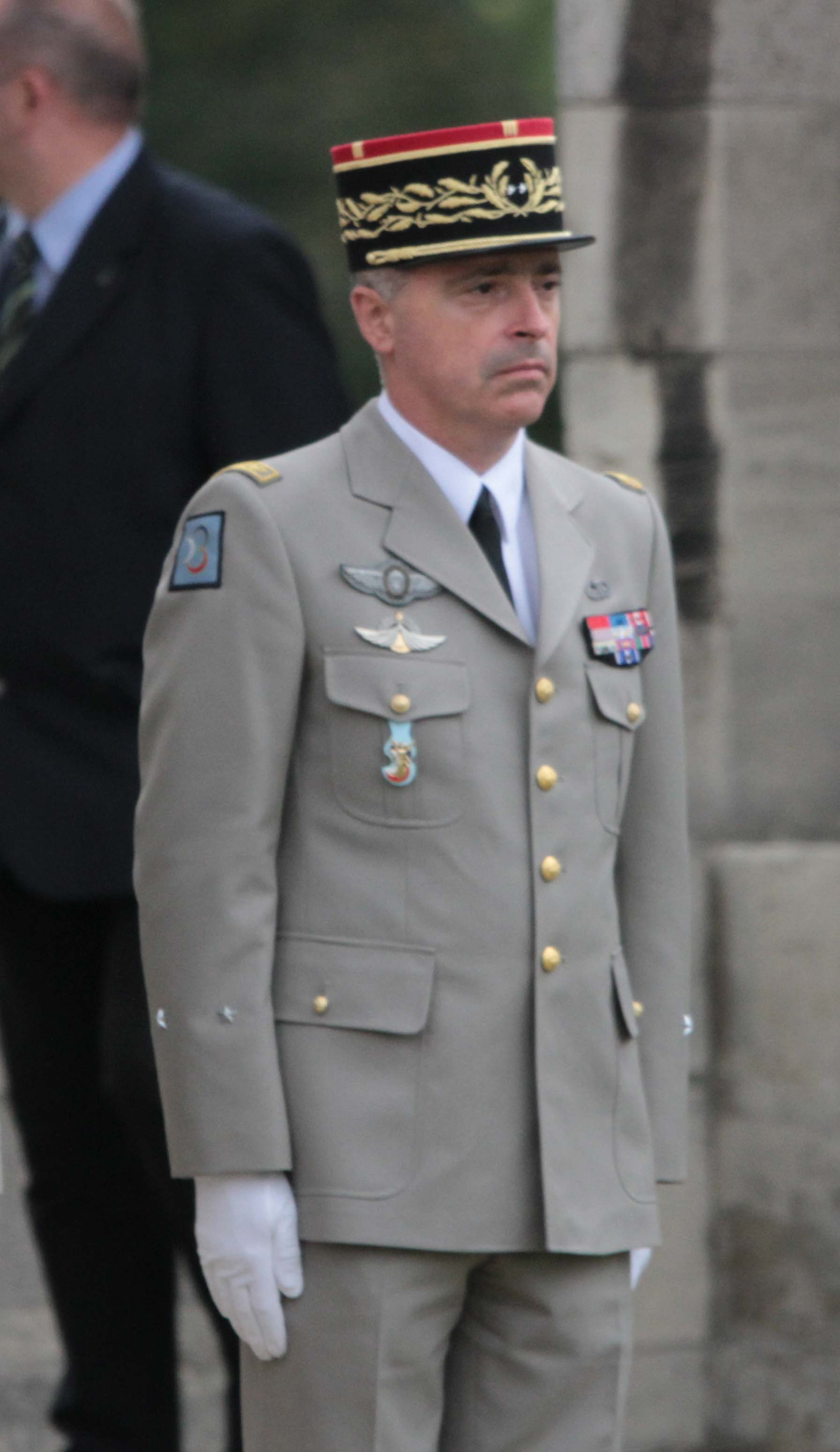 Général Bernard Barrera au Chateau de Vincennes le 17/09/2011